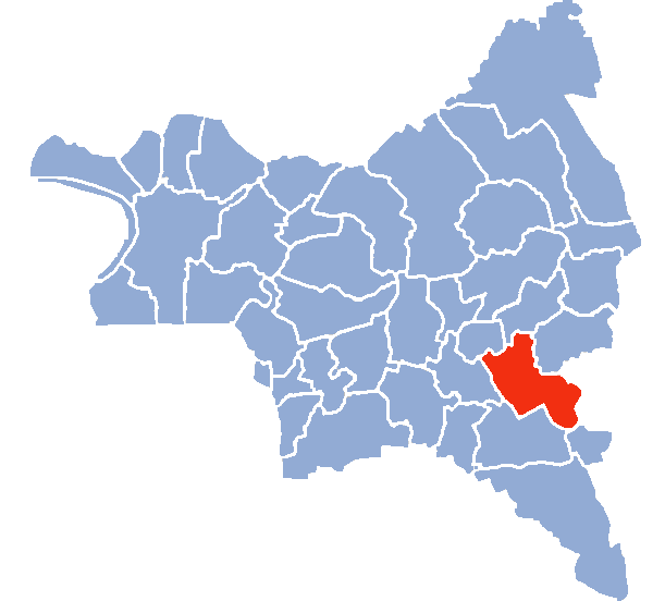 Auteur Hervé SUAUDEAU Licensing Catégorie:Cartes de Seine-saint-Denis Catégorie:Gagny